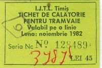 Abonament Tramvai Timişoara 1982